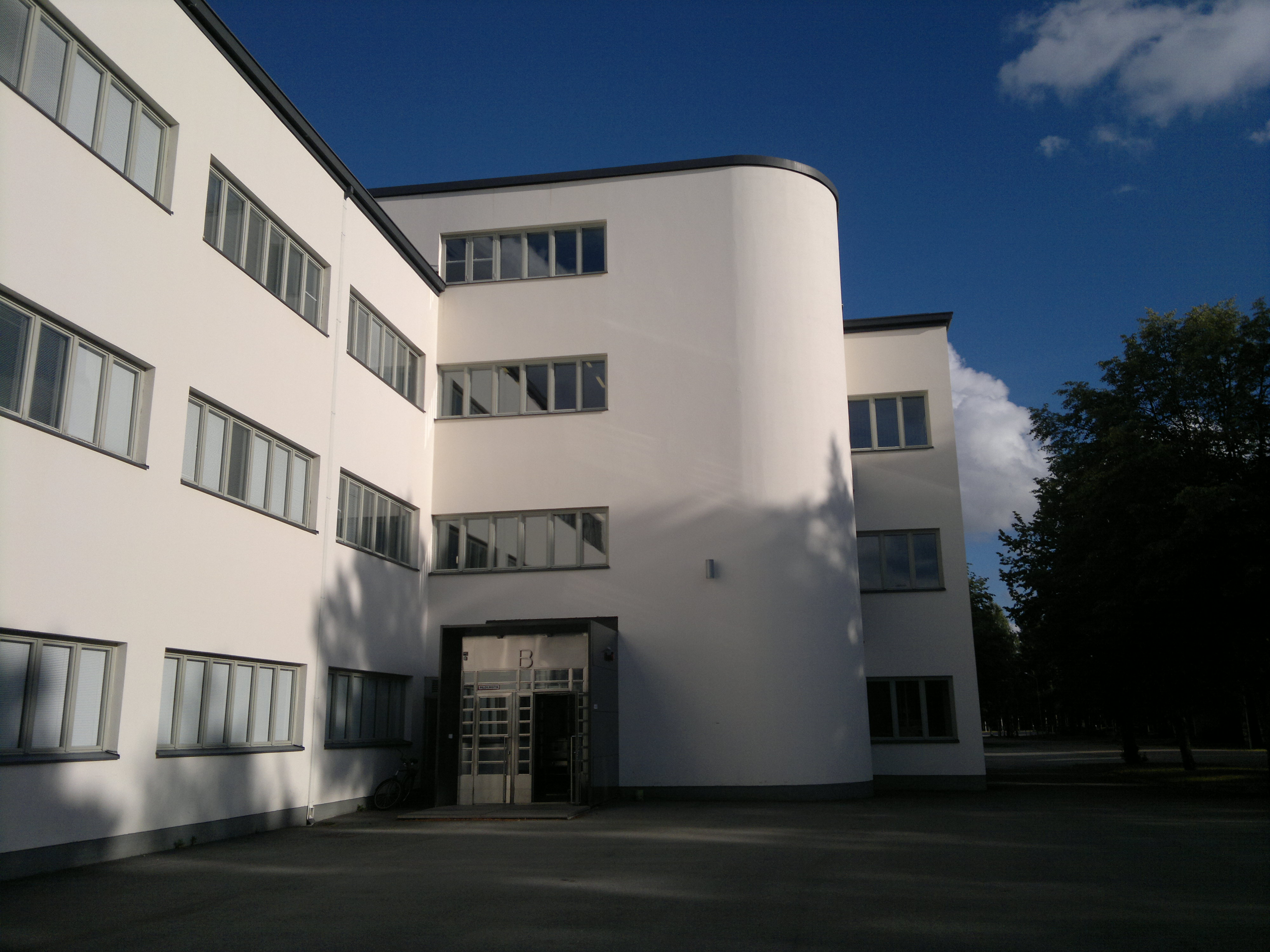 Niinisalon kasarmirakennus, B-lamellin sisäänkäynti.